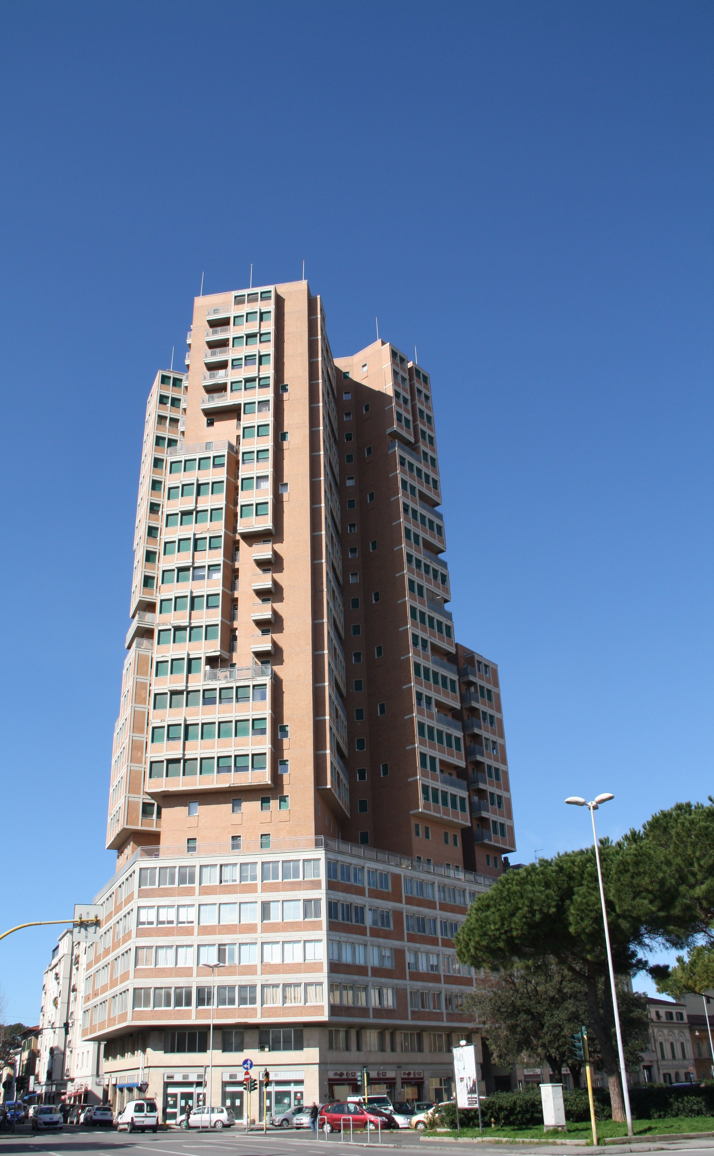 Italy, Livorno, Piazza Matteotti. The skyscraper.